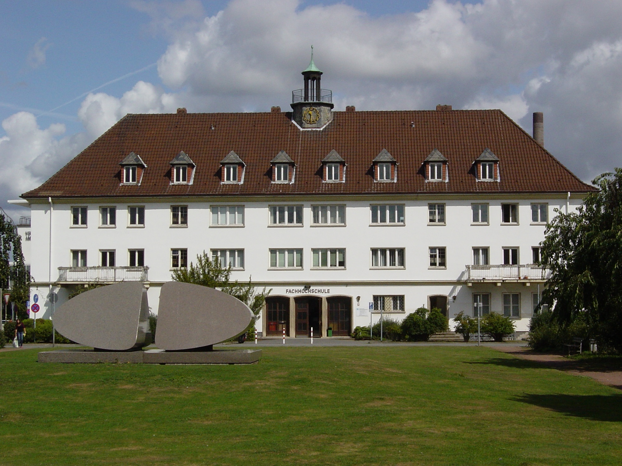 Brezelfenster-Denkmal "Rückblick", Ostfalia Hochschule für angewandte Wissenschaften, Robert-Koch-Platz 12, 38440 Wolfsburg